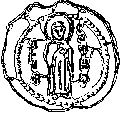 Пячатка Сафіі